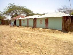 Historia Concordia